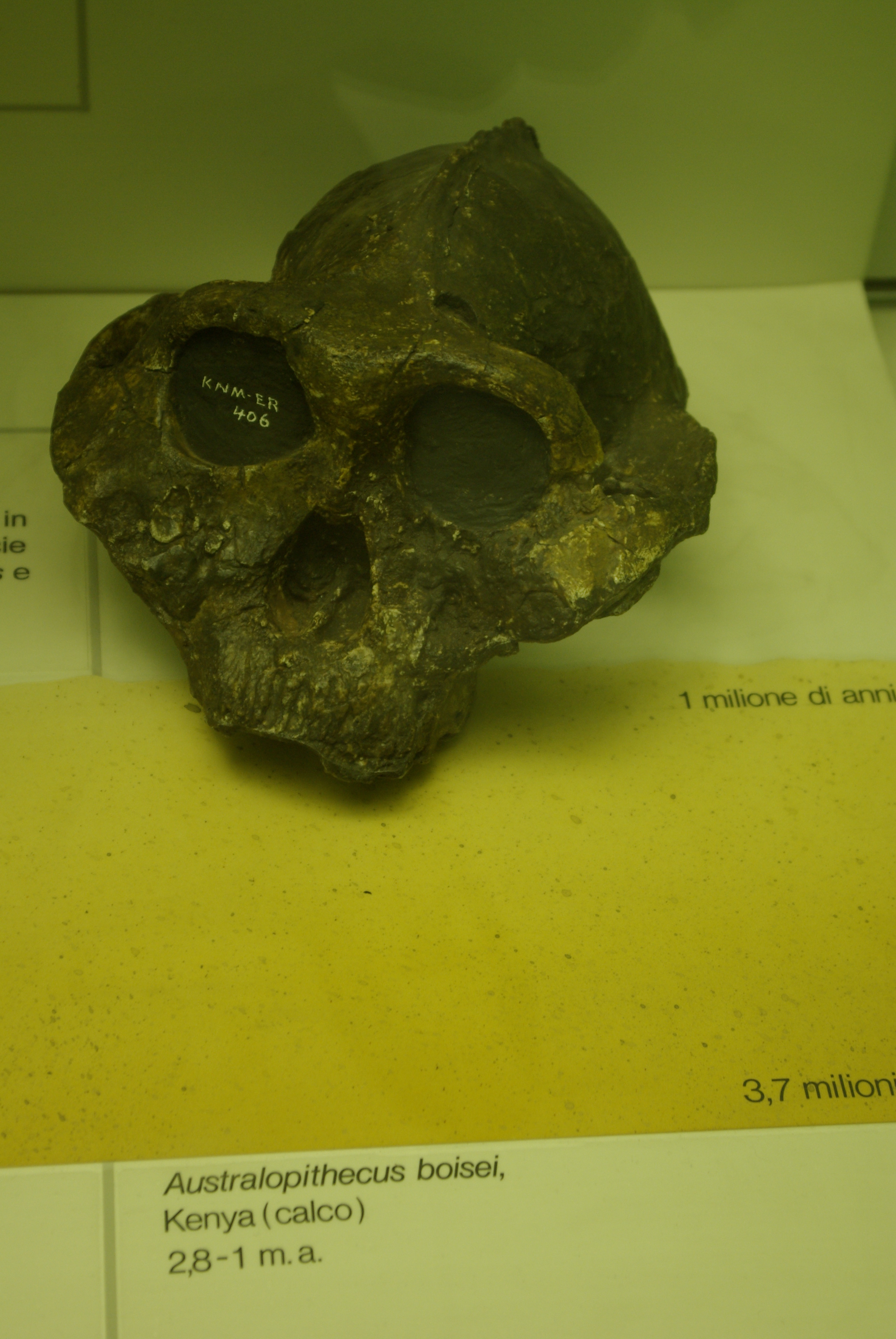 Museo civico di storia naturale This is a photo of a monument which is part of cultural heritage of Italy.